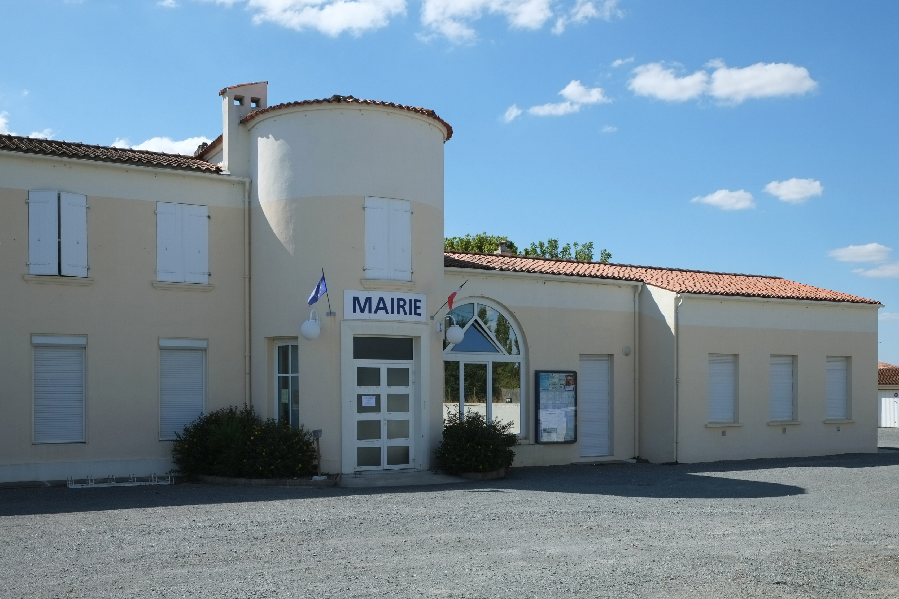 Mairie Chambon Charente-Maritime france